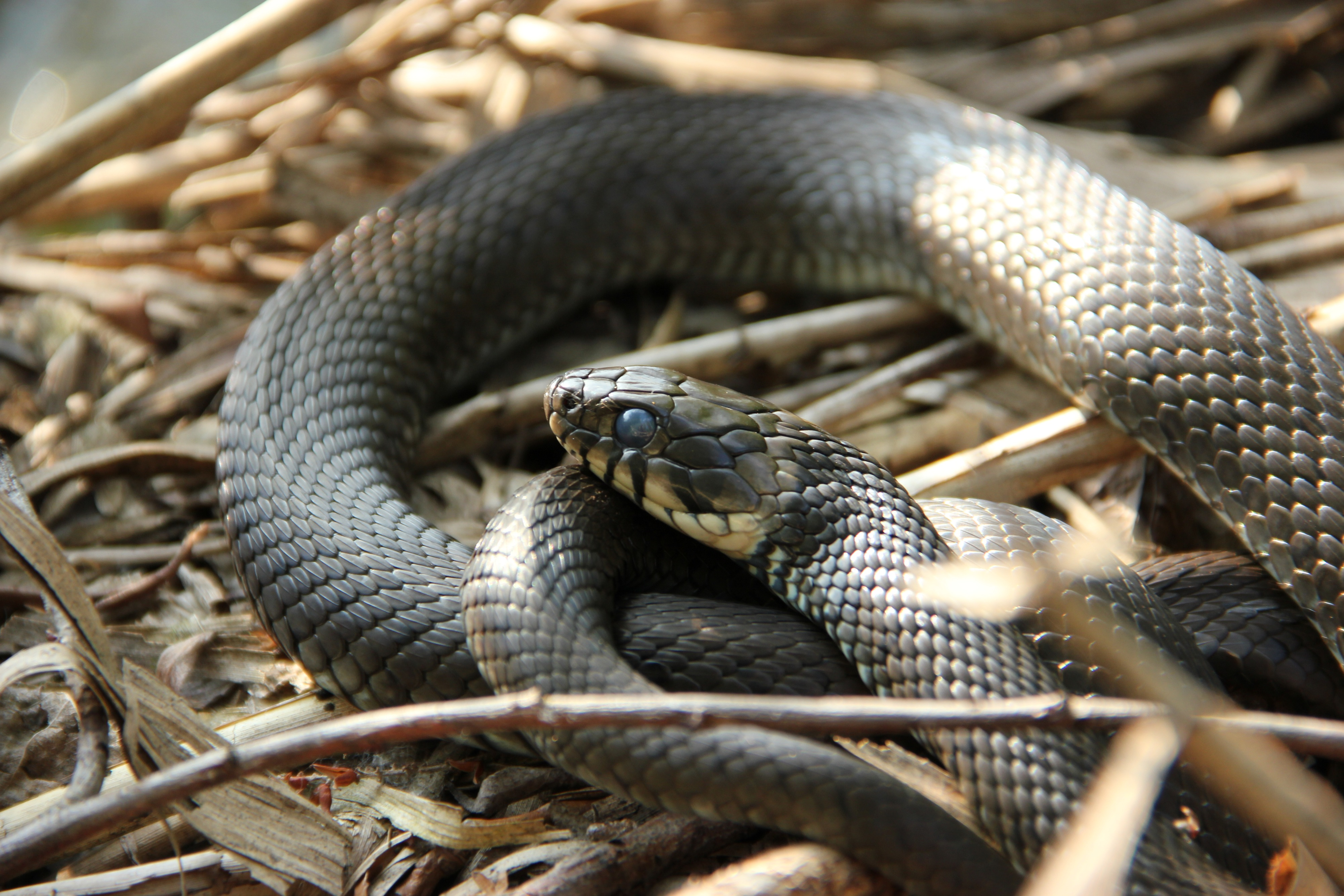 Ringelnatter Natrix natrix in Schilf des Bettenauer Weihers